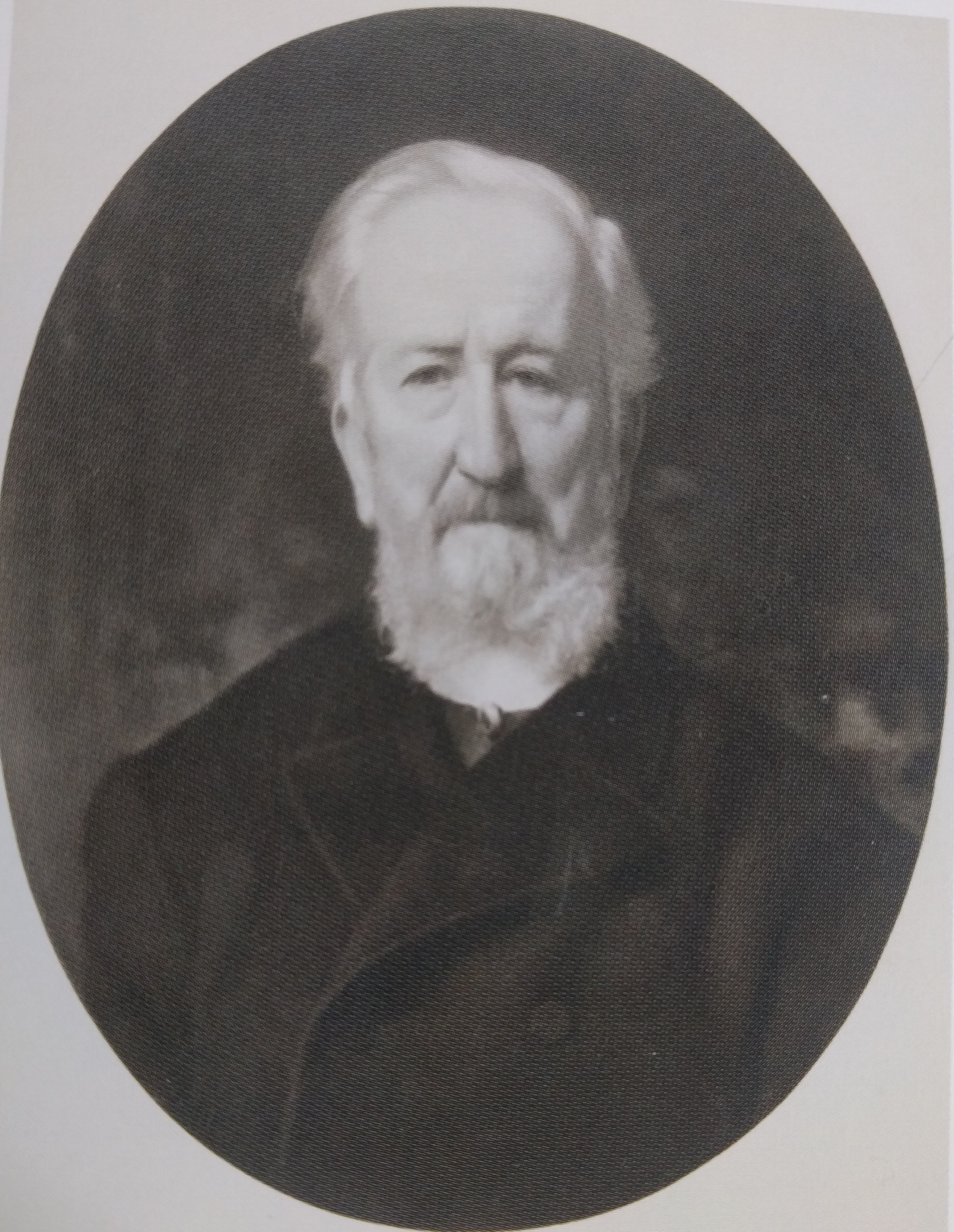 ritratto di Giuseppe Poggi effettuato da Antonio Ciseri nel 1889 Ca'.